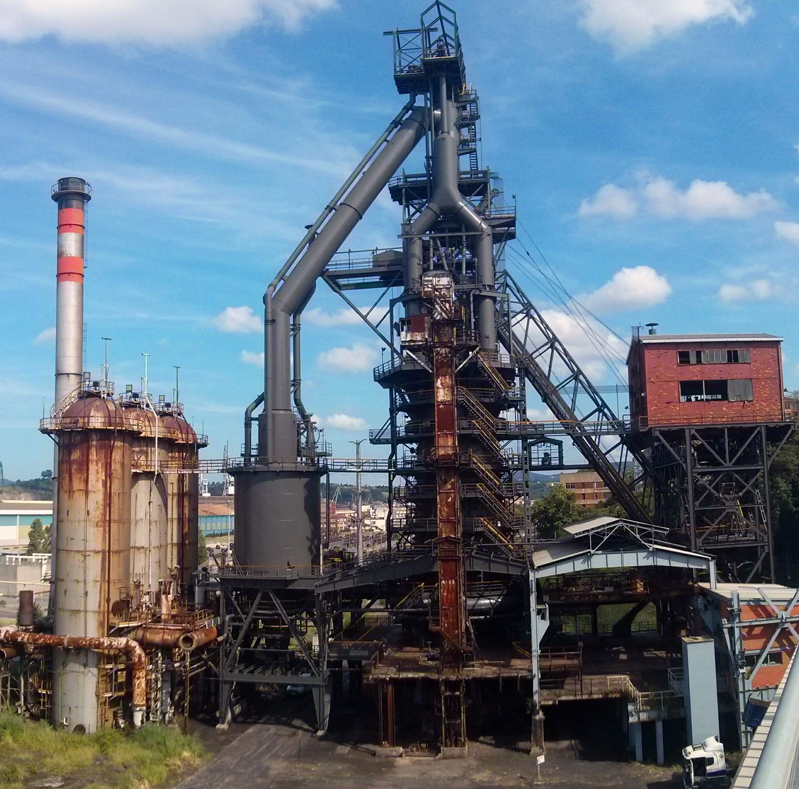 Sestaoko "Altos Hornos de Vizcaya"-ko enpresaren Maria Angeles labe garaia. Egun zutik gelditzen den bakarra.